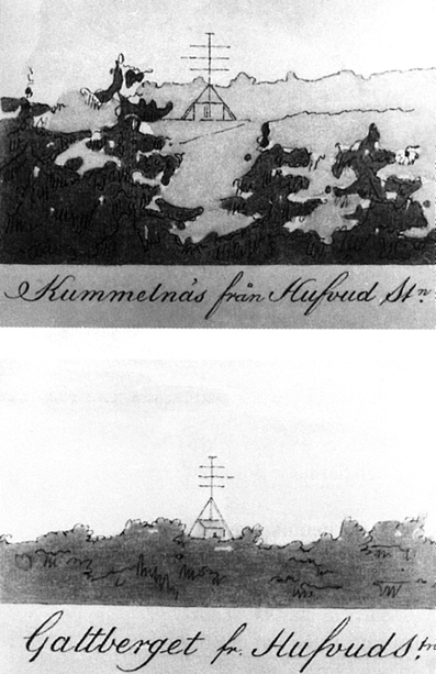 Optiska telegrafens stationer Kummelnäs och Galtberget så som de syntes från huvudstationen vid Mosebacke i Stockholm. (Efter illustration på karta i Telemuseum)